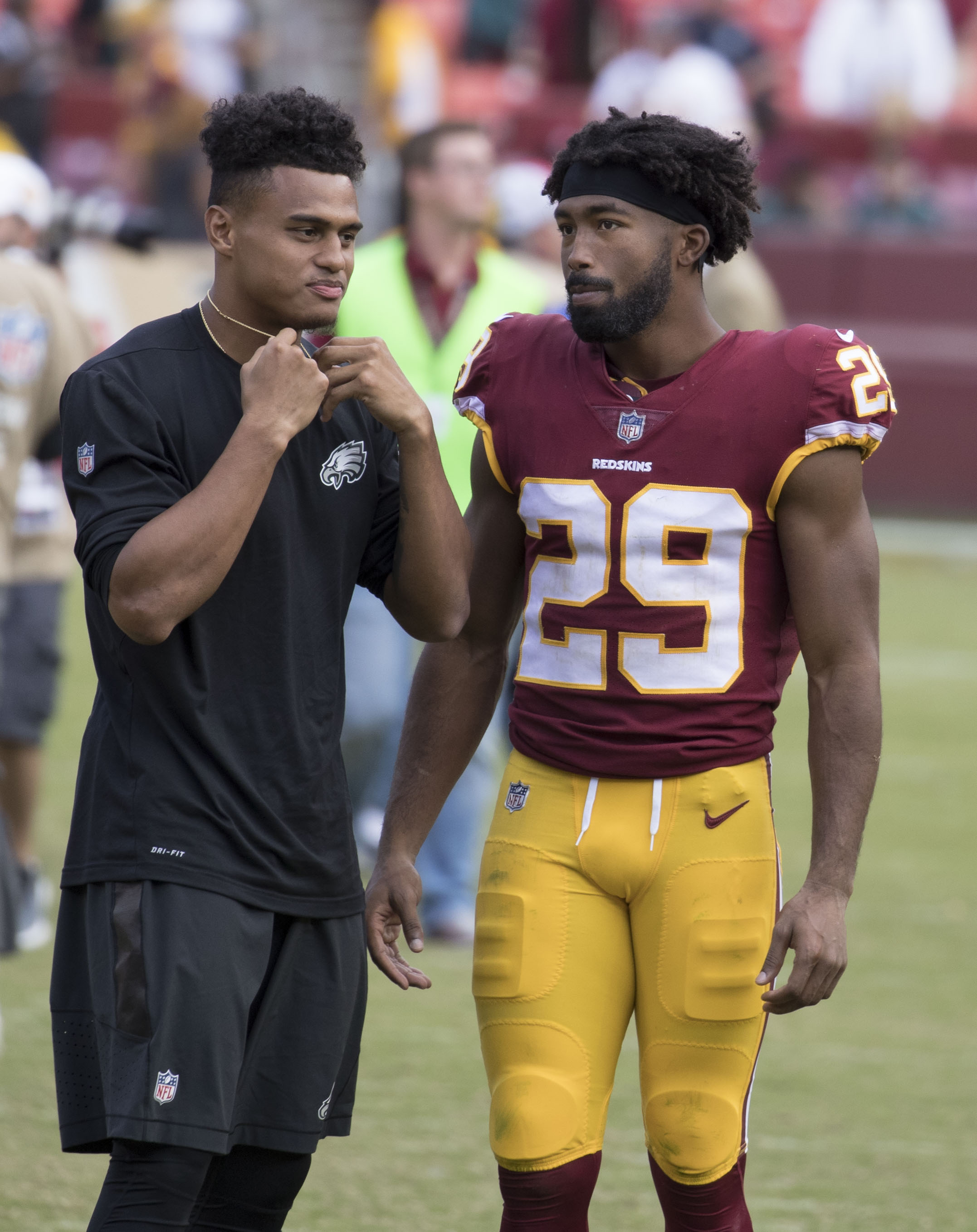 Eagles at Redskins 9/10/17